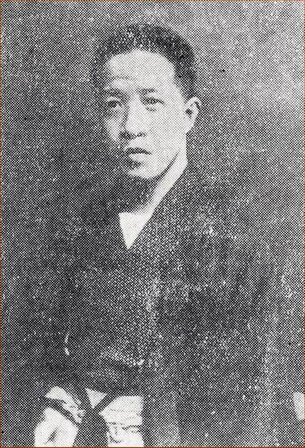 Чжан Бин Линь - китайский философ, политик, анархист (газетное фото 1915-1920 гг)